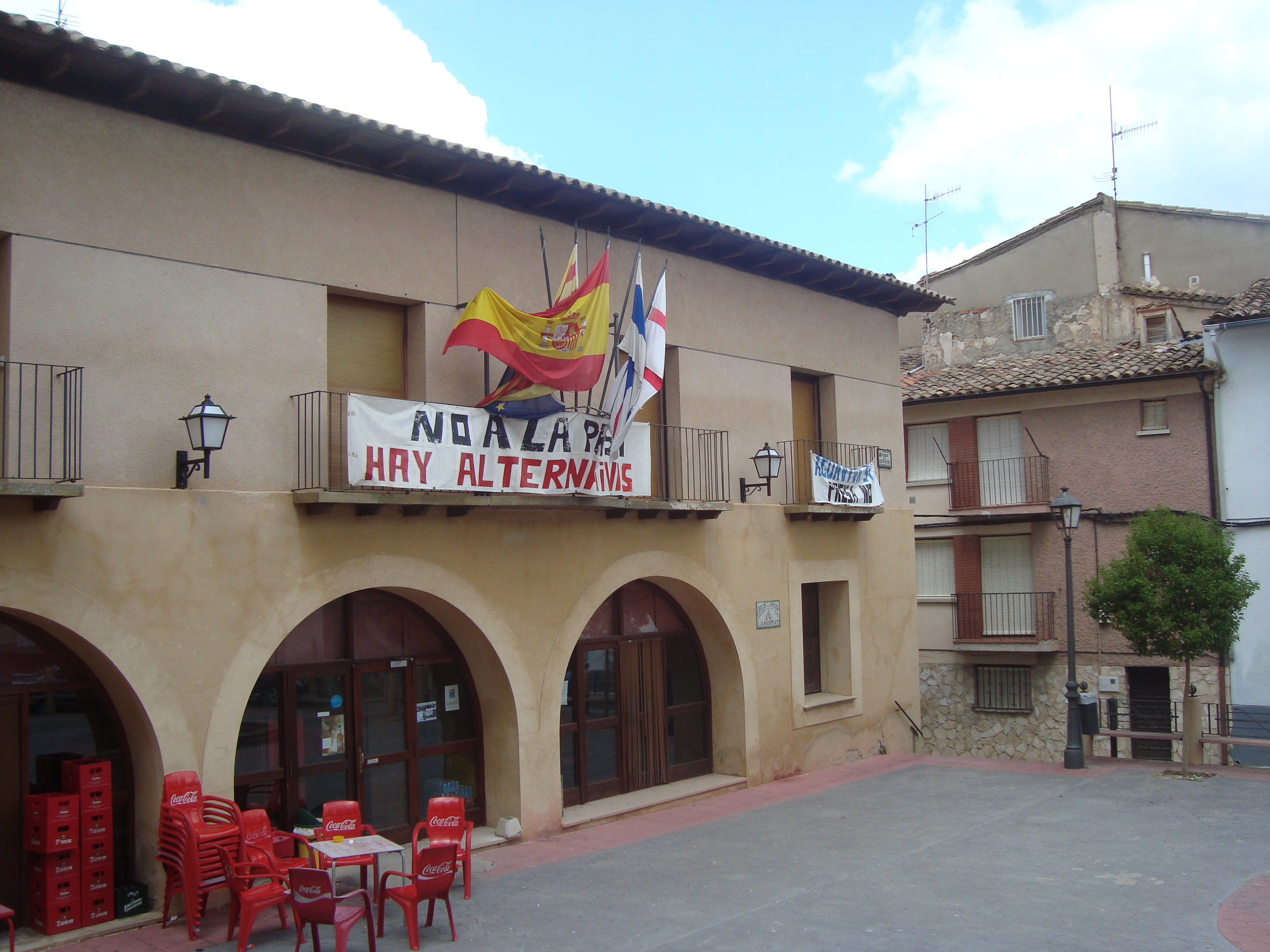 Ayuntamiento de Aguaviva (Teruel, Aragón)